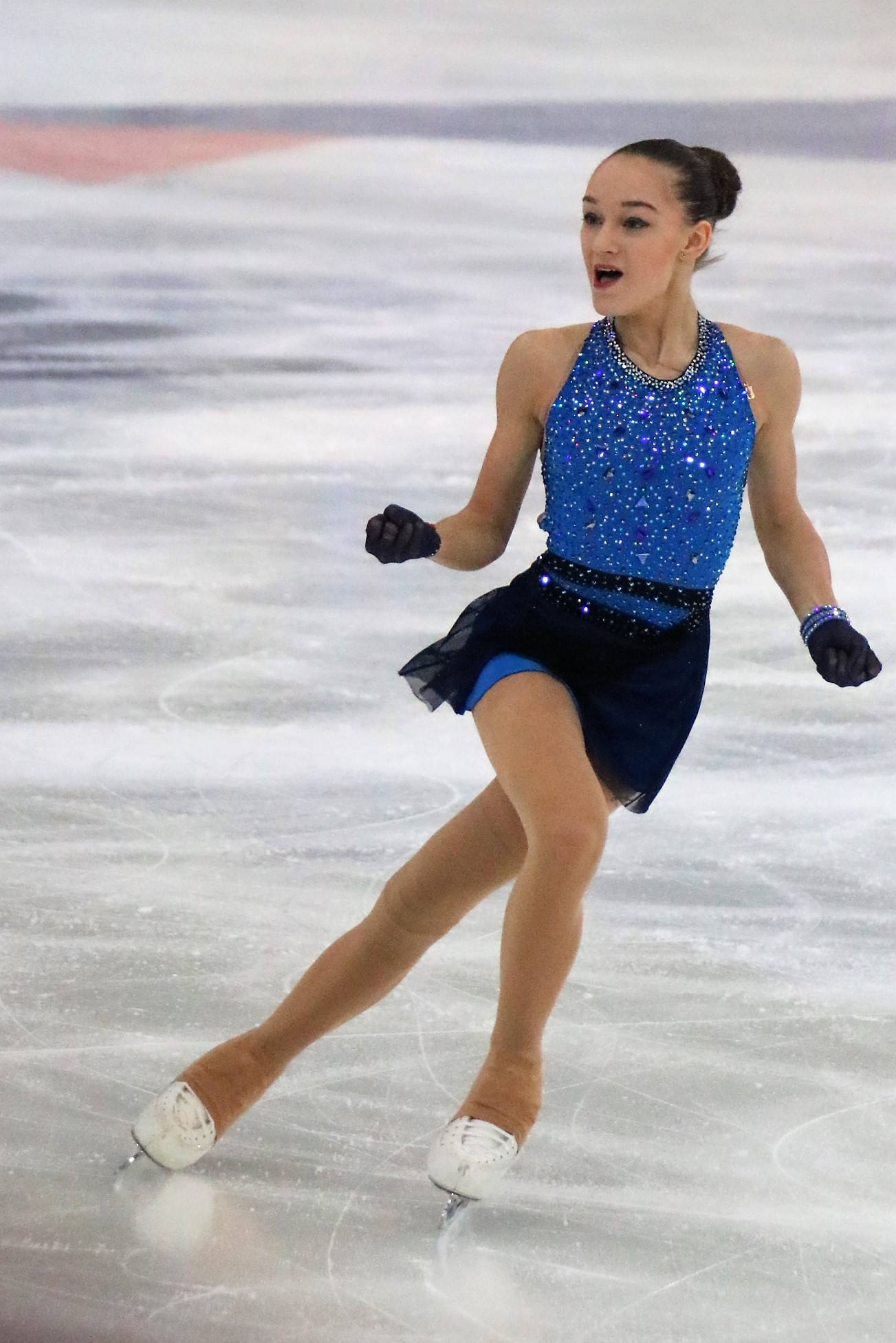 Анна Тарусина на чемпионате России по фигурному катанию на коньках 2019